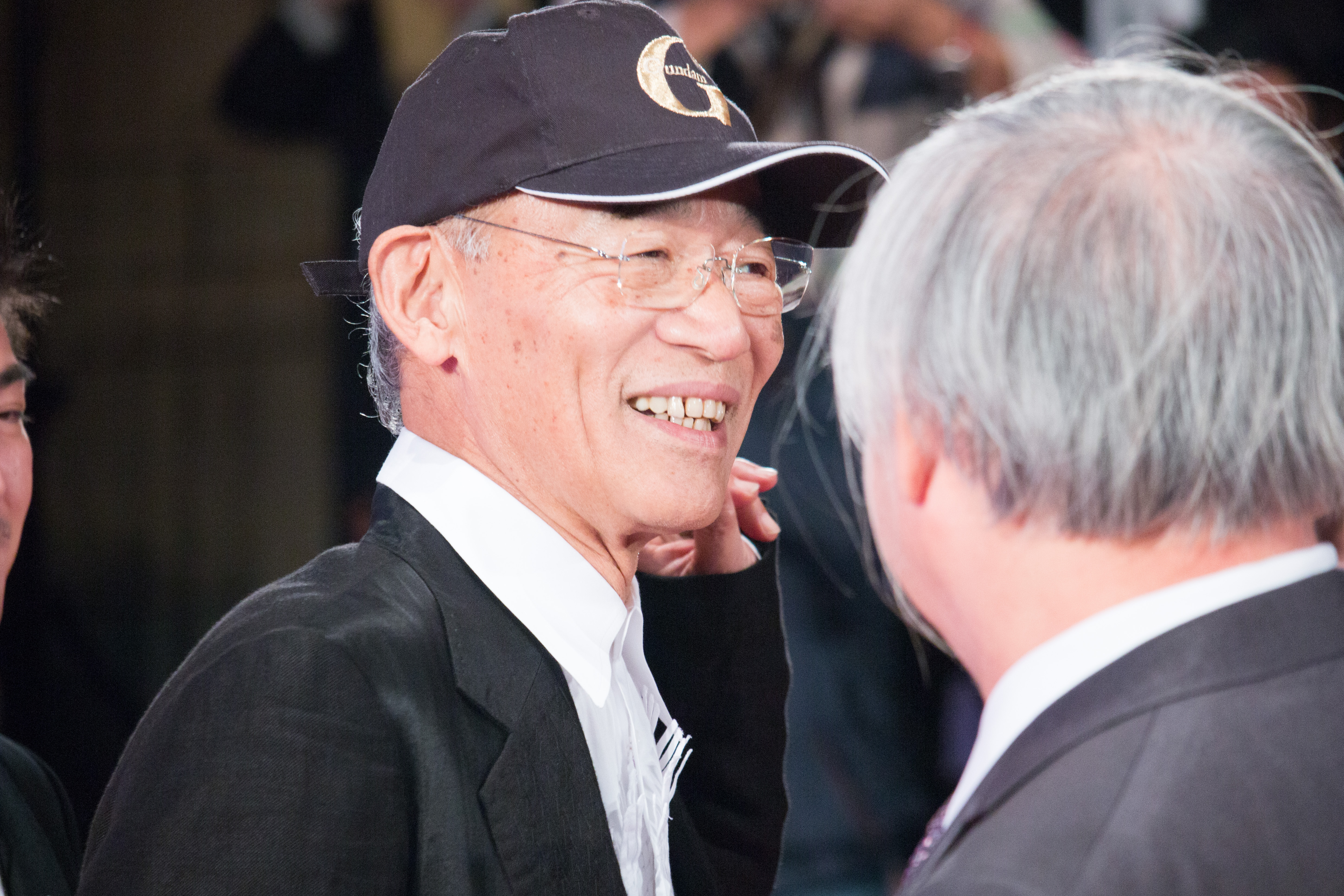 第28回 東京国際映画祭 オープニングセレモニー 富野由悠季 (ガンダムとその世界)